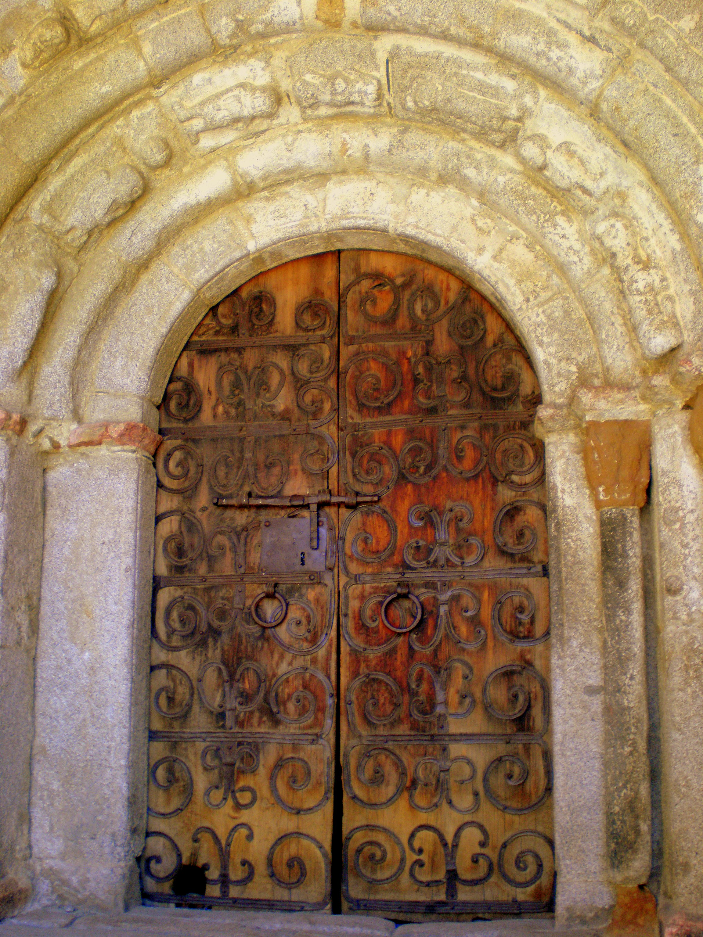 Meranges - Porta romànica de l'església parroquial de Sant Sadurní